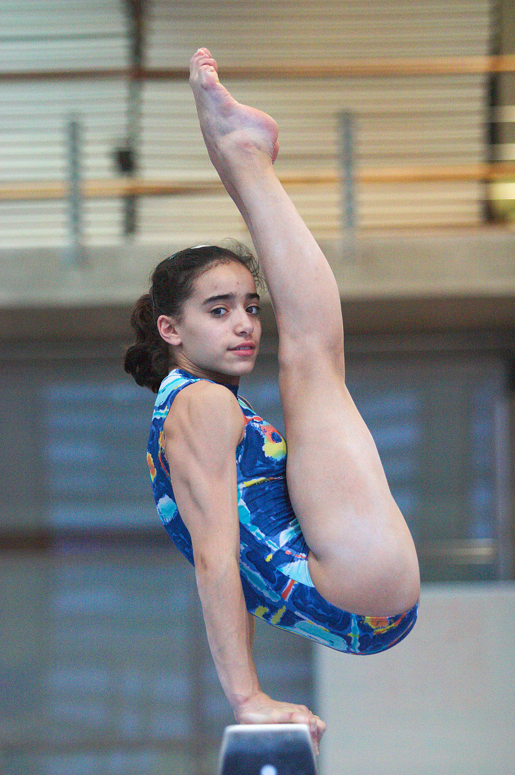 Tania Gener en el CAR de Madrid el 9 de junio de 2004.